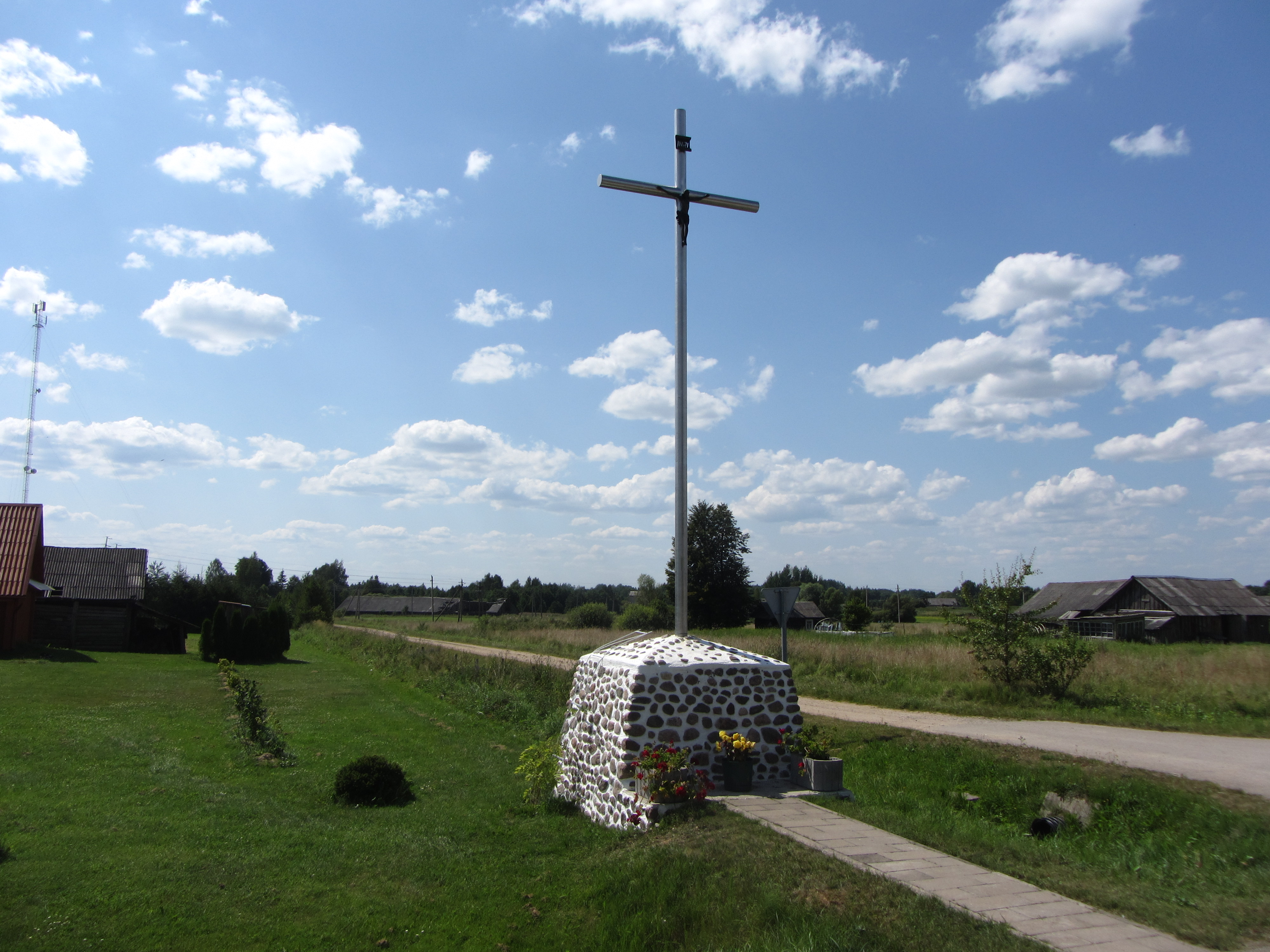 Svylionys, Lithuania